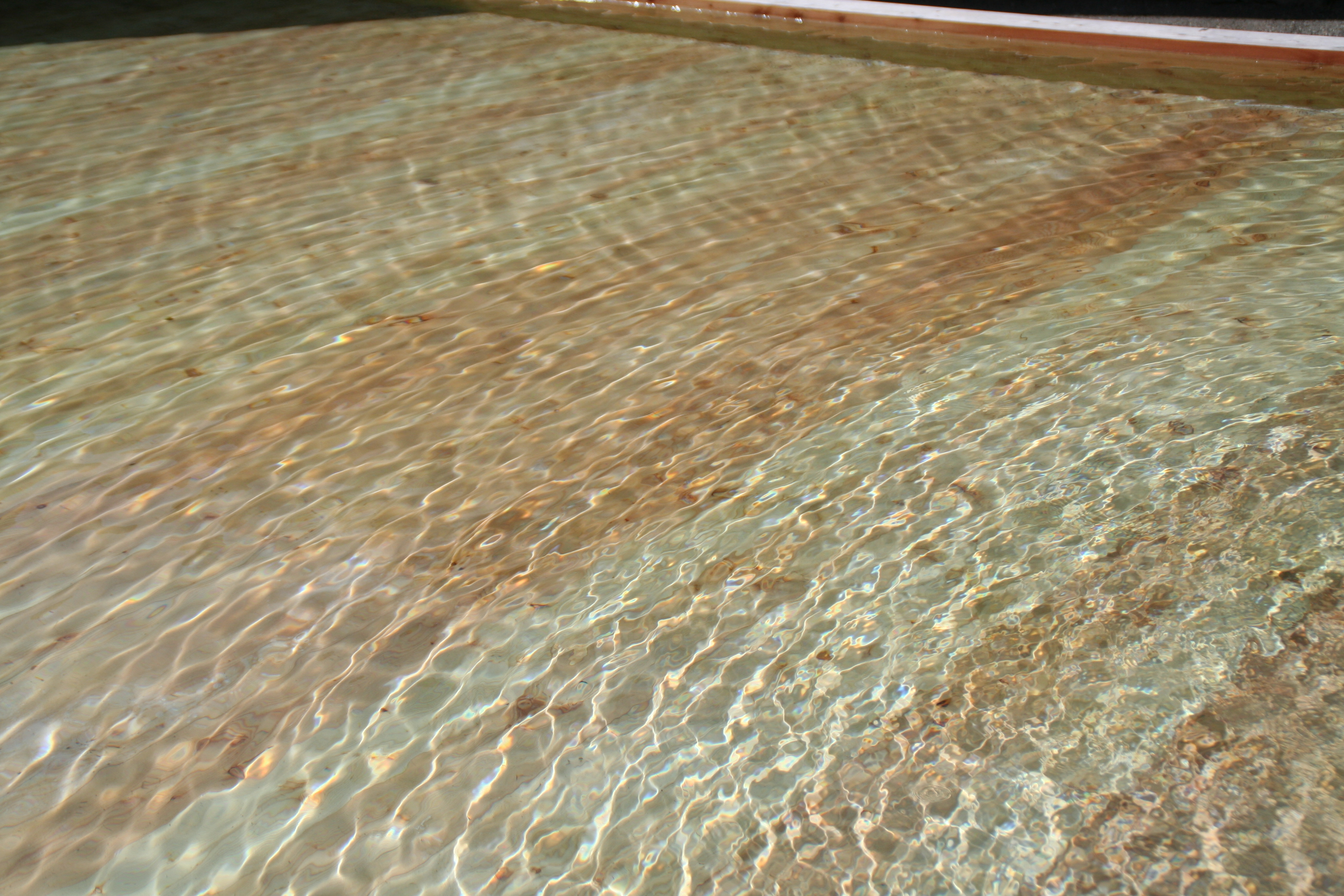 Valendas Dorfbrunnen